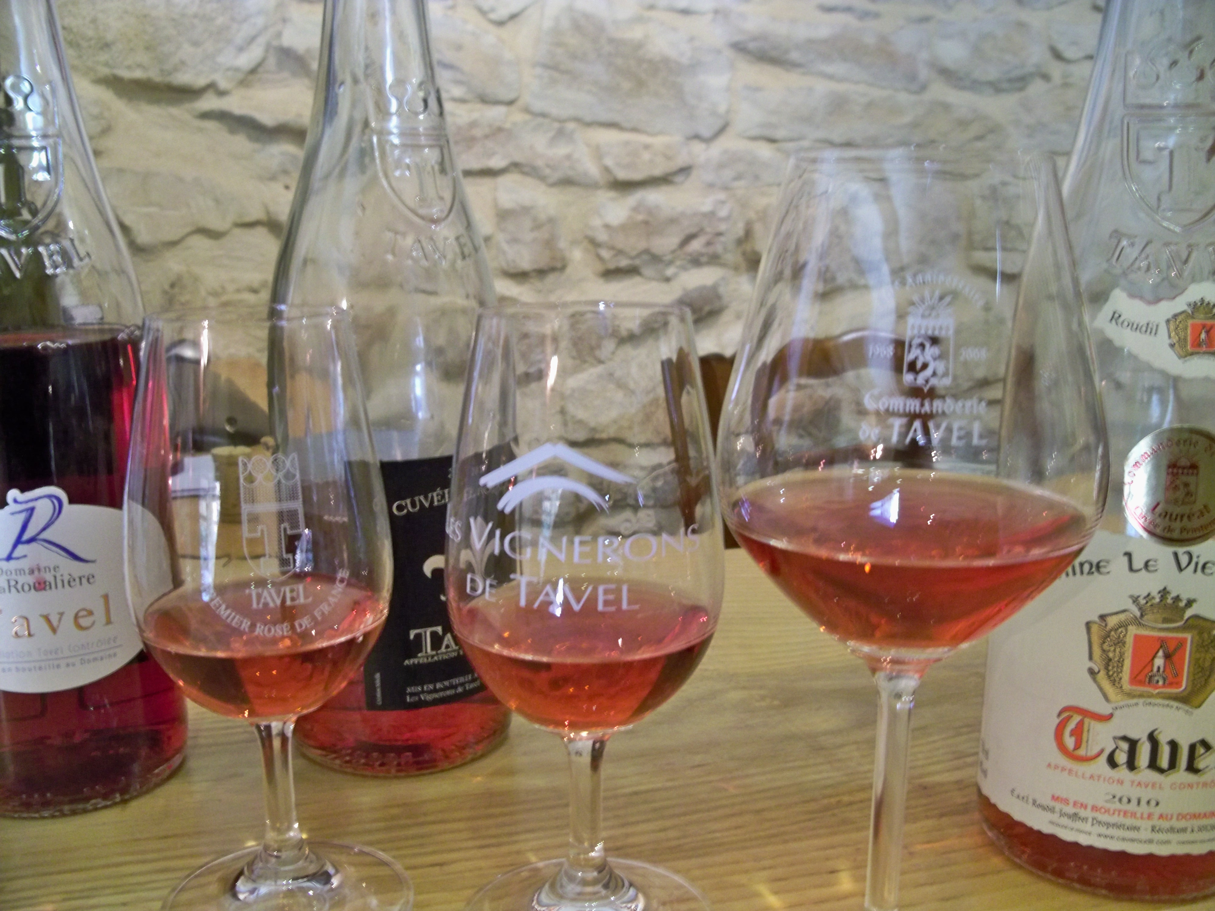 Glasses of Tavel wines